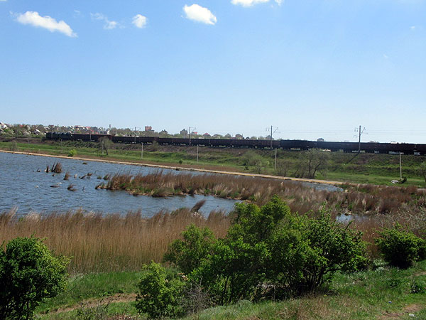 Sukhoy liman, Ukraine